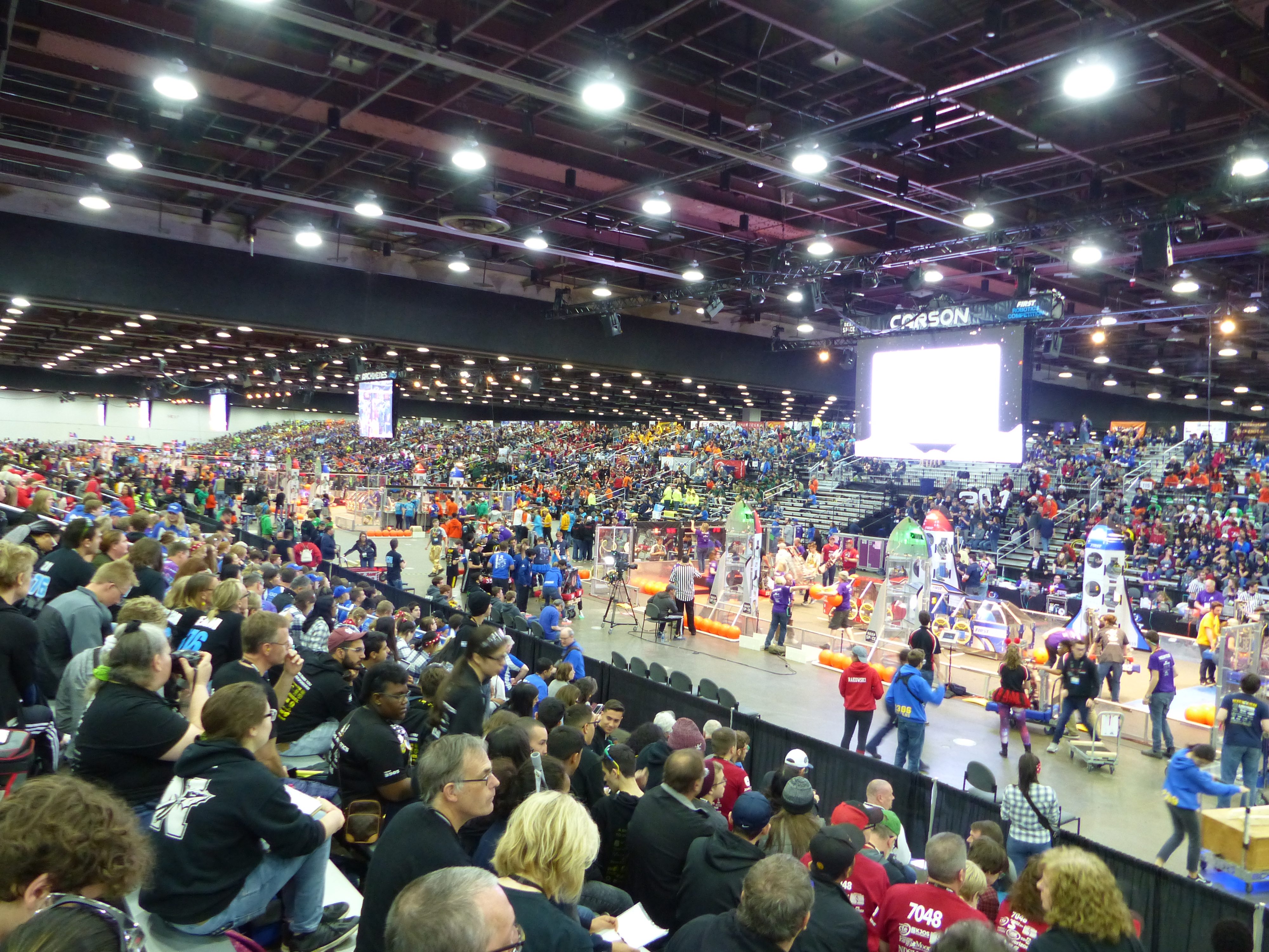 Wettkampfbereich während der Spiele